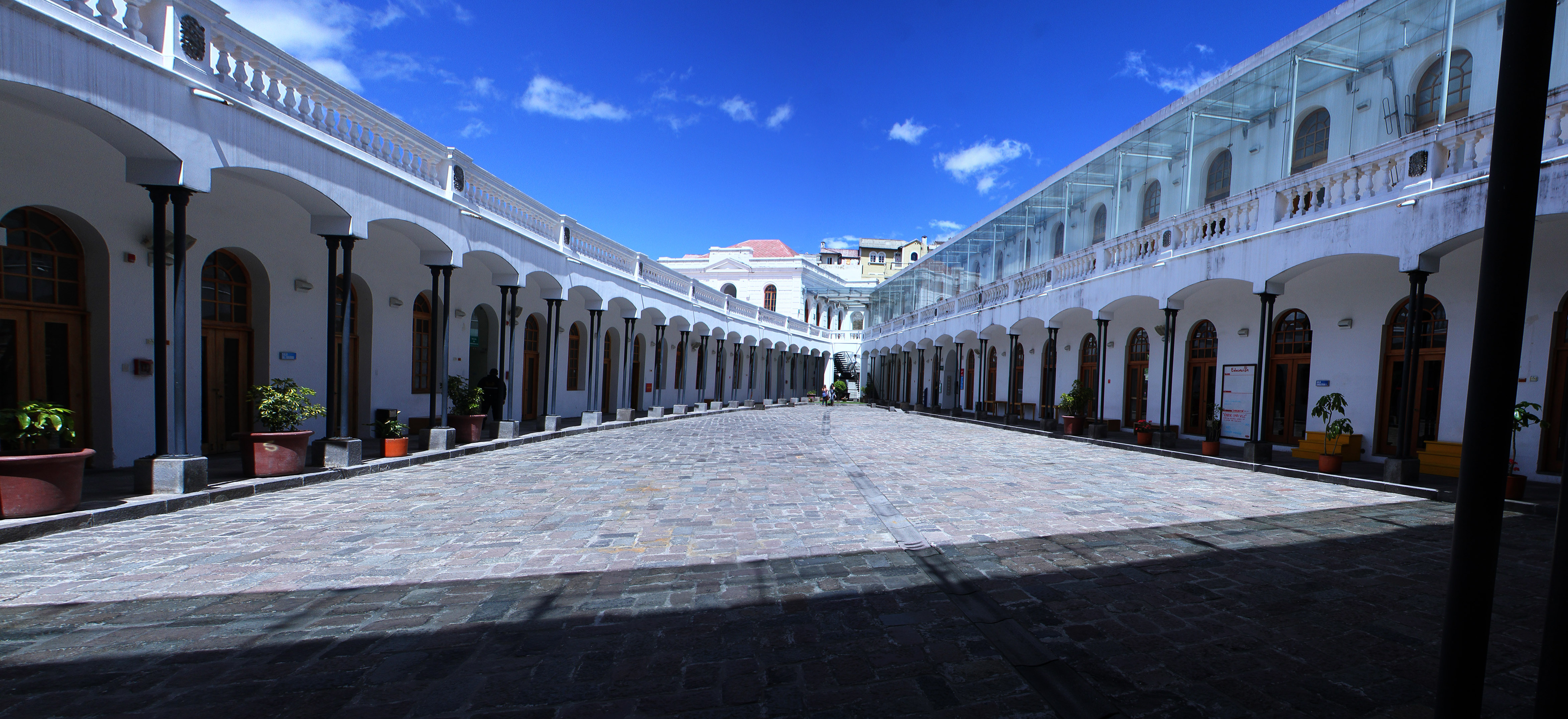 Quito, 23 Jun (Andes).- El centro de arte contemporáneo en Quito, que funciona en el antiguo hospital Militar, se convertirá el primer museo arte contemporáneo del país en octubre del 2016. Fotografías: Carlos Rodríguez/Andes